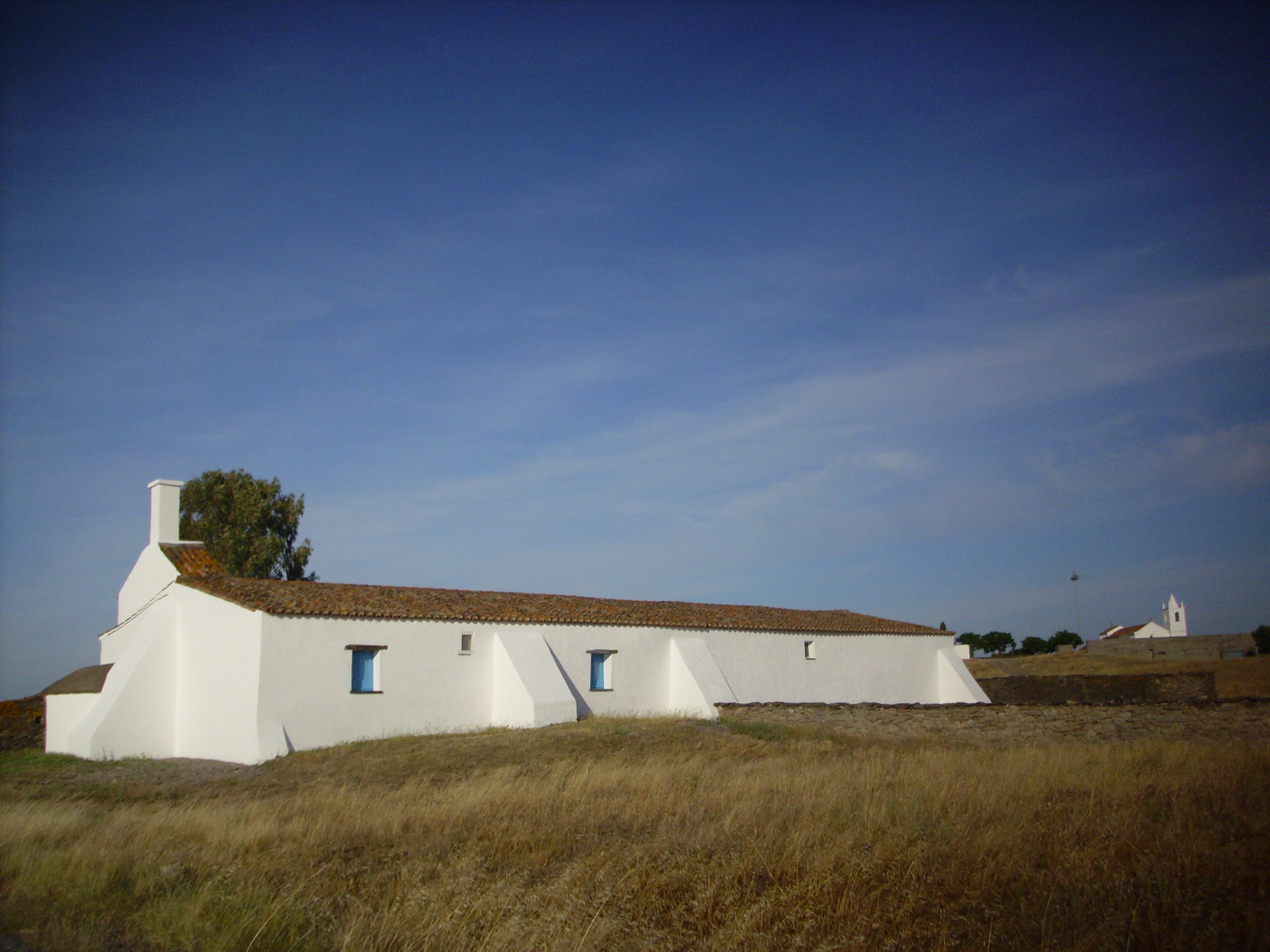 Aldeia da Luz